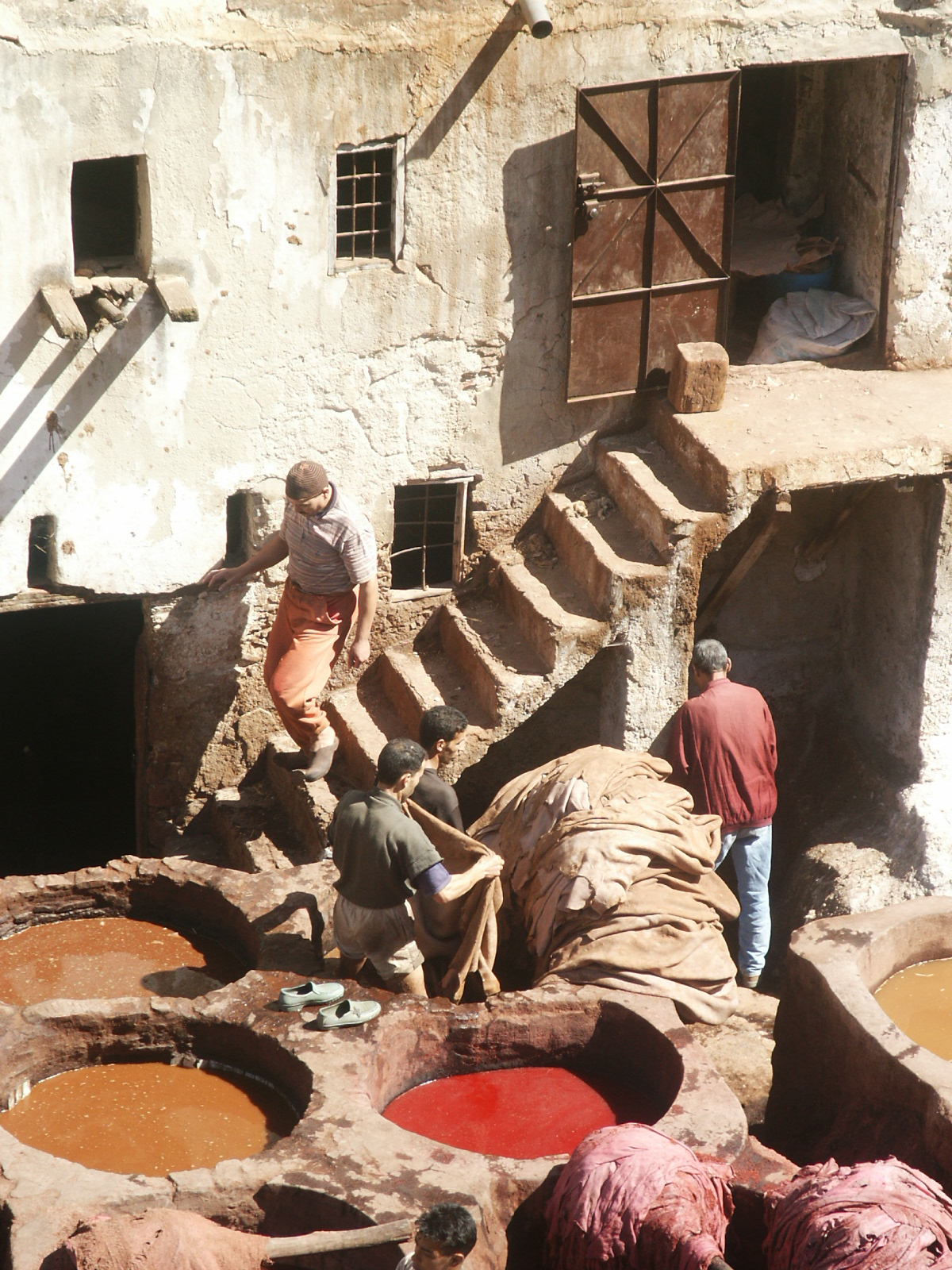 Fez Tannery